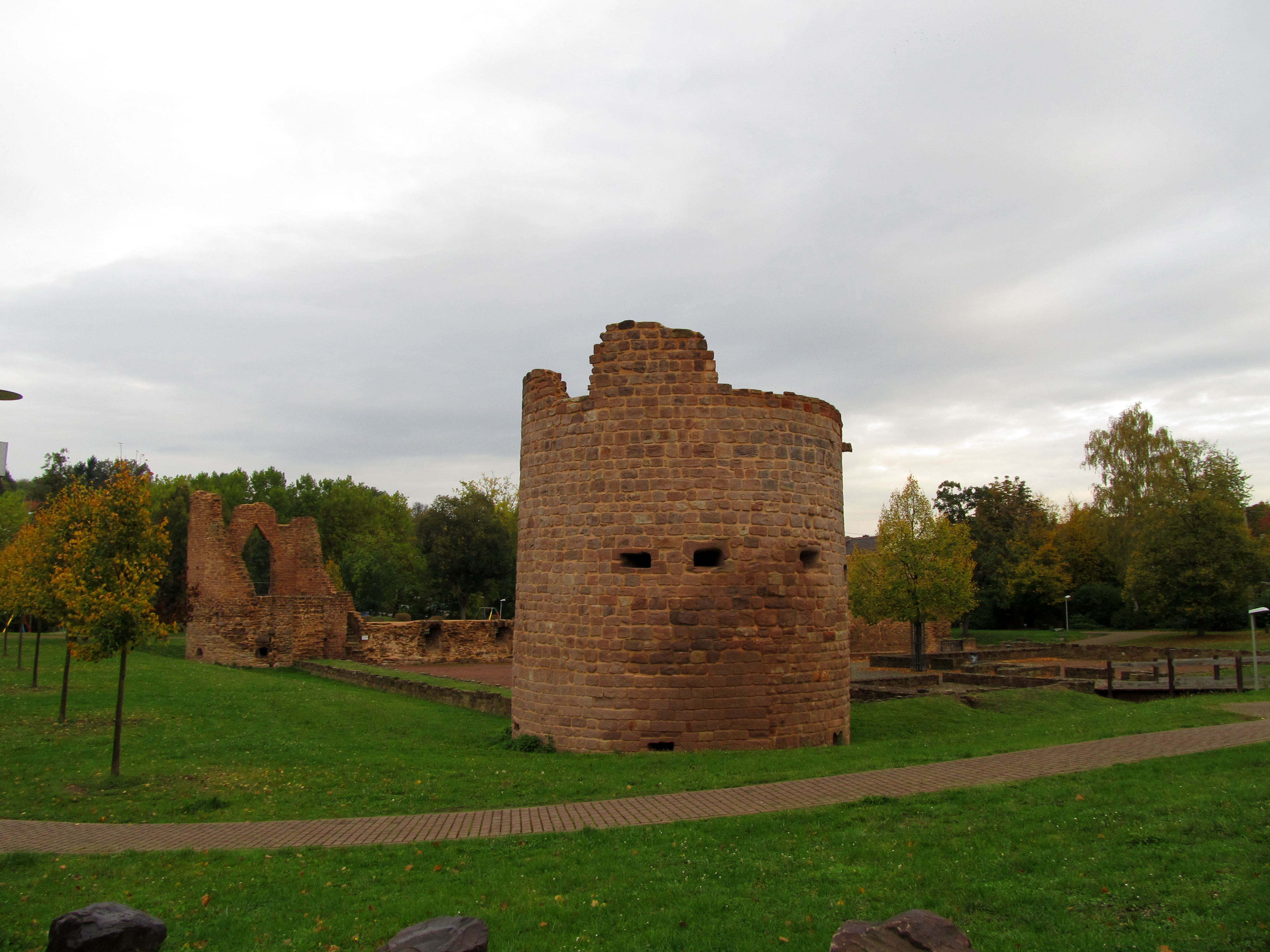 Ruine der Burg Bucherbach in Köllerbach, einem Stadtteil von Püttlingen, Saarland